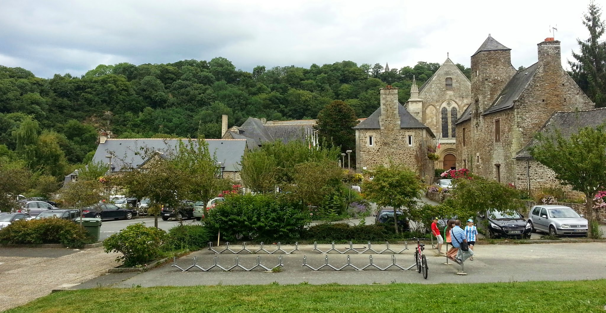 Léhon (22)